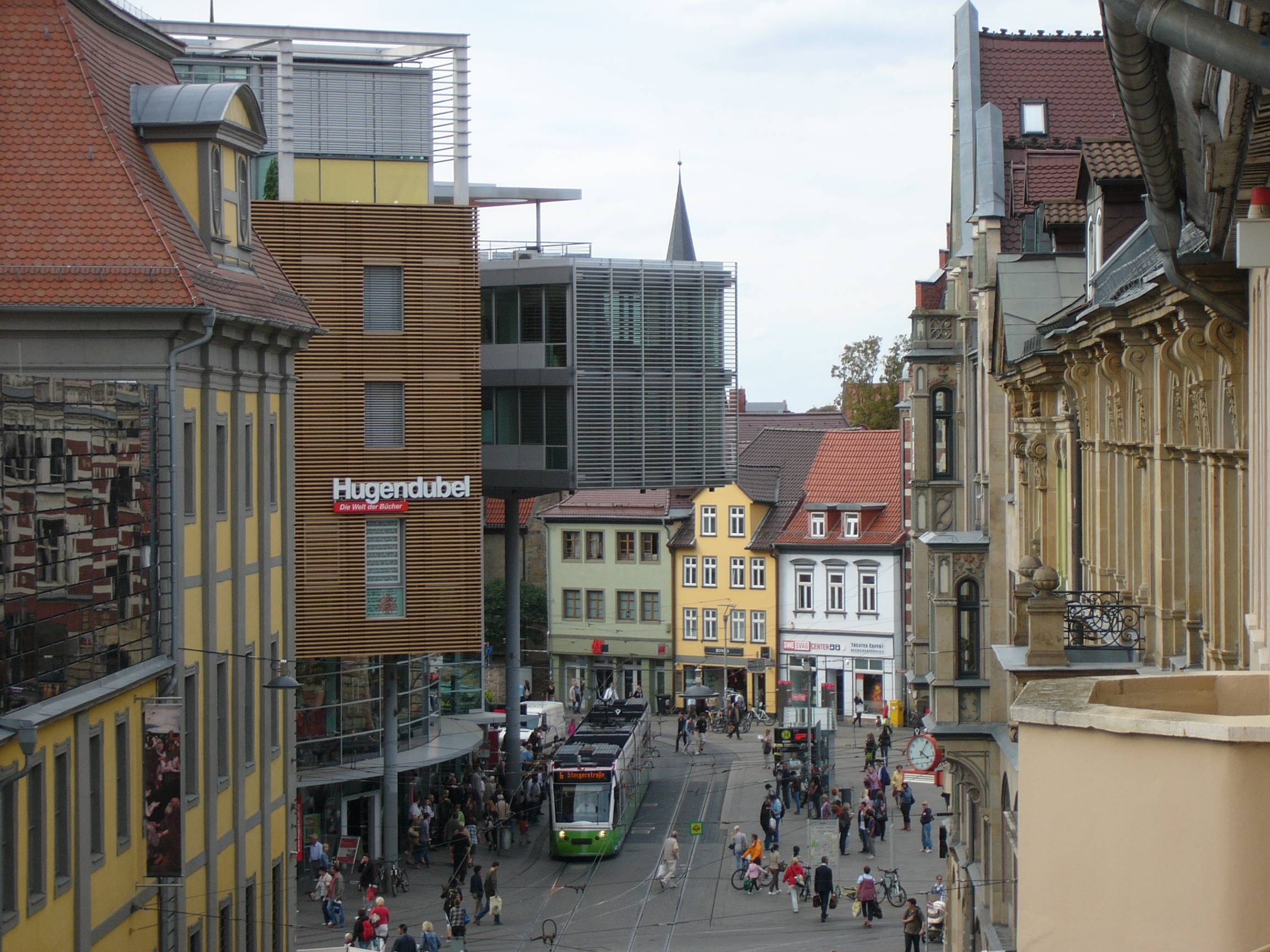 Blick aus der Erfurter Bahnhofstraße in Richtung Anger bzw. Schlösserstraße.